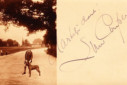 Ansichtkaar door Couperus in 1923, vlak voor zijn dood, besteld. Hier met opdracht. De schrijver staat met zijn hond Brinio in wandelkostuum voor zijn nieuwe huis in De Steeg